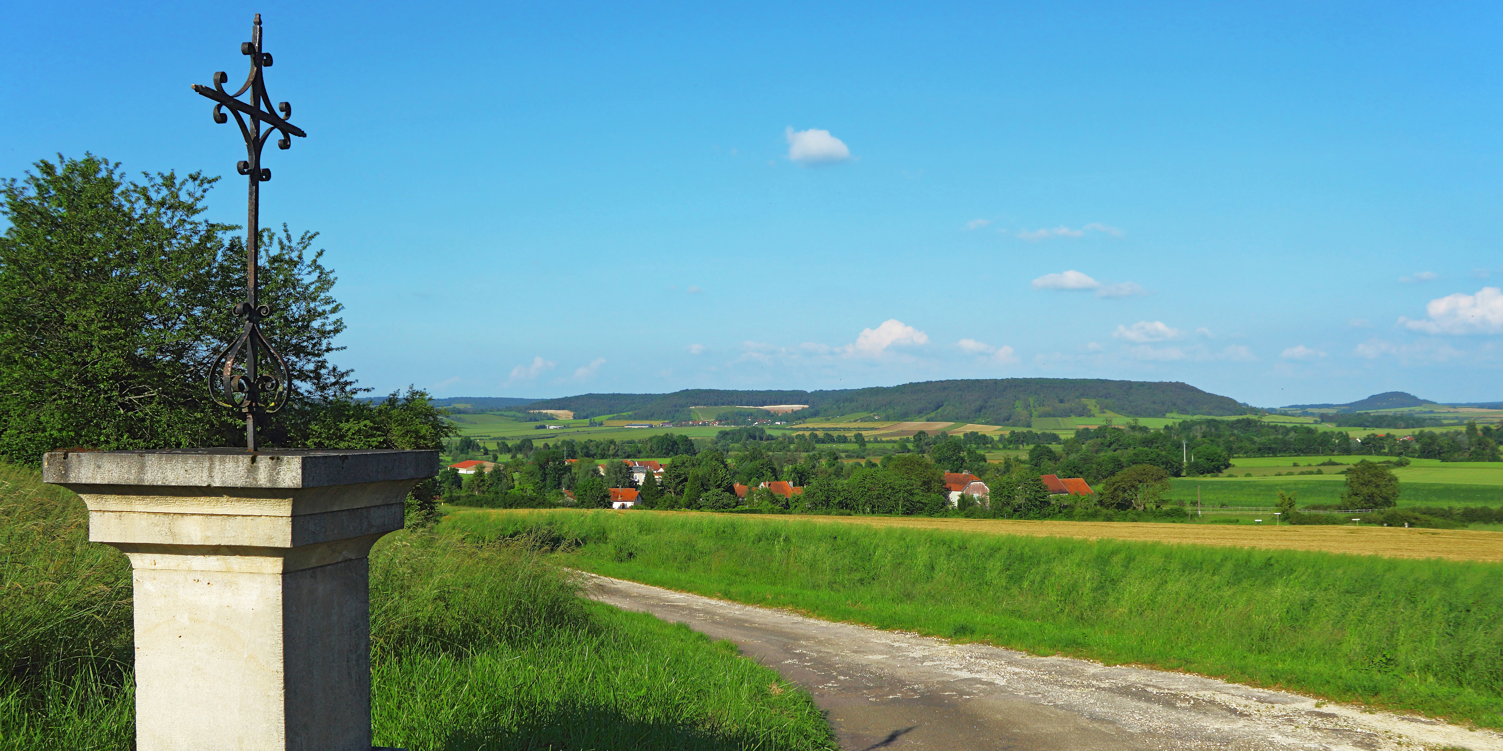 Vix et colline tabulaire de la Grande-Montagne (315 m) vus de la croix du chemin Mont-Lassois-des-Vignes